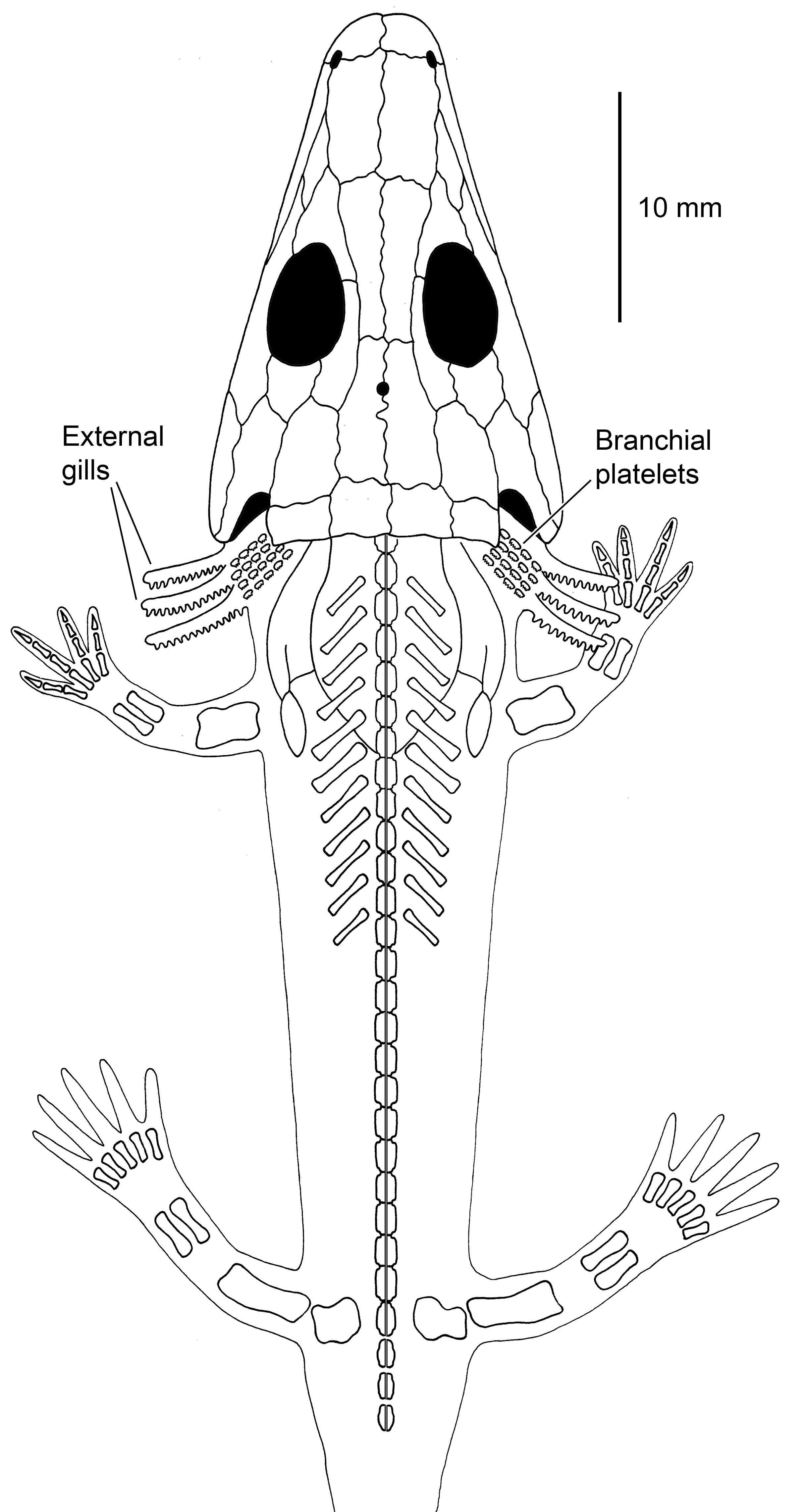 Reconstruction of a small larva of Archegosaurus decheni showing three pairs of external gills and branchial platelets. Redrawn and modified after Witzmann (2004a).